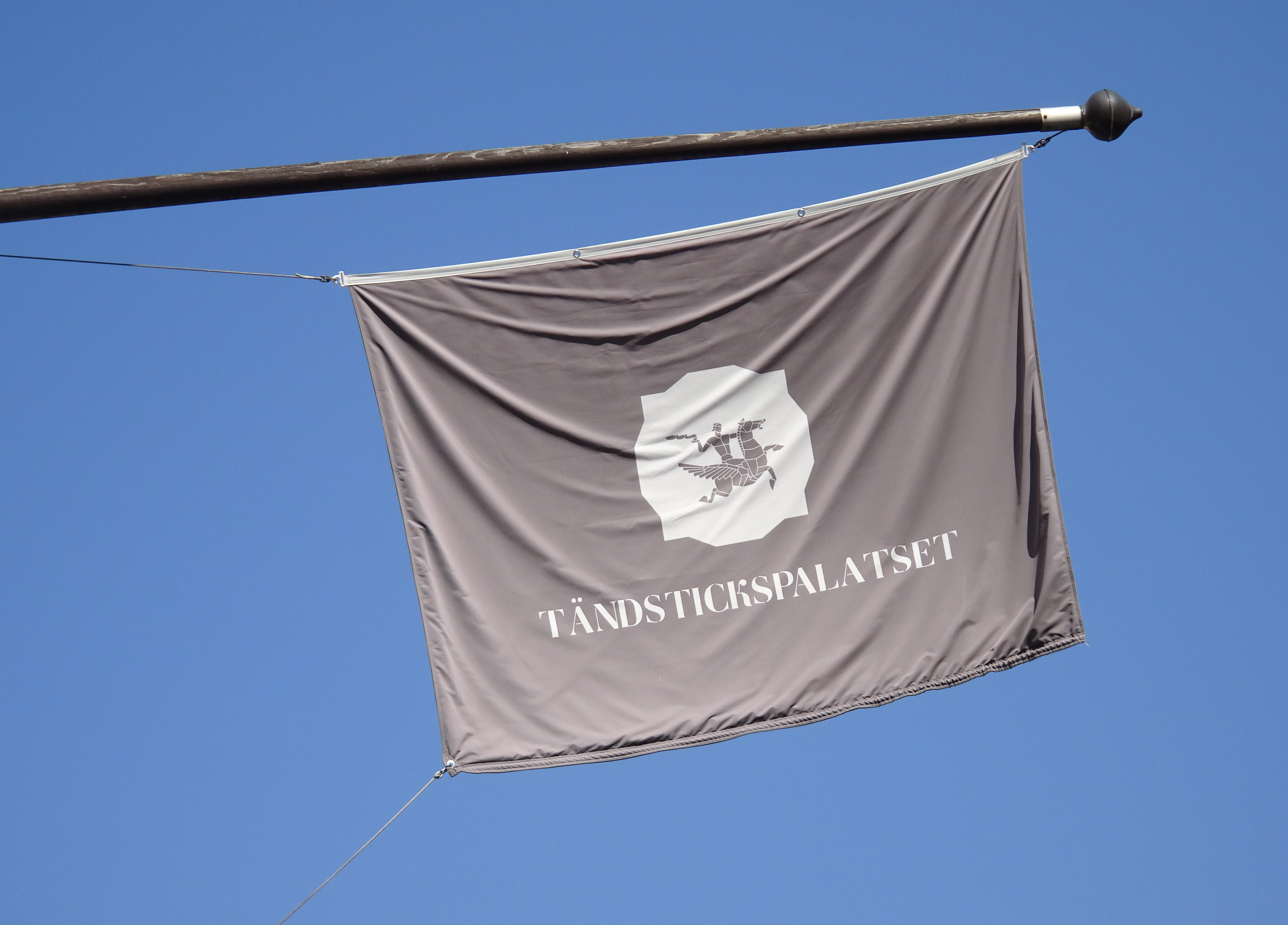 Tändstickspalatset flagga